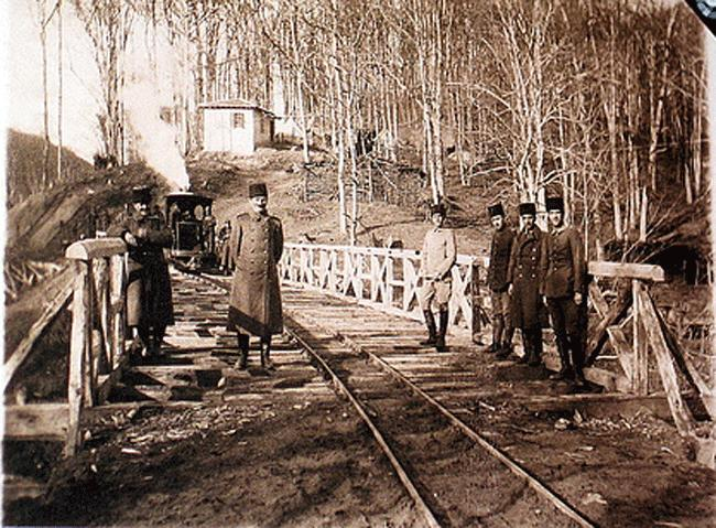 Haliç-Karadeniz Sahra Hattı'nın yapım süreci